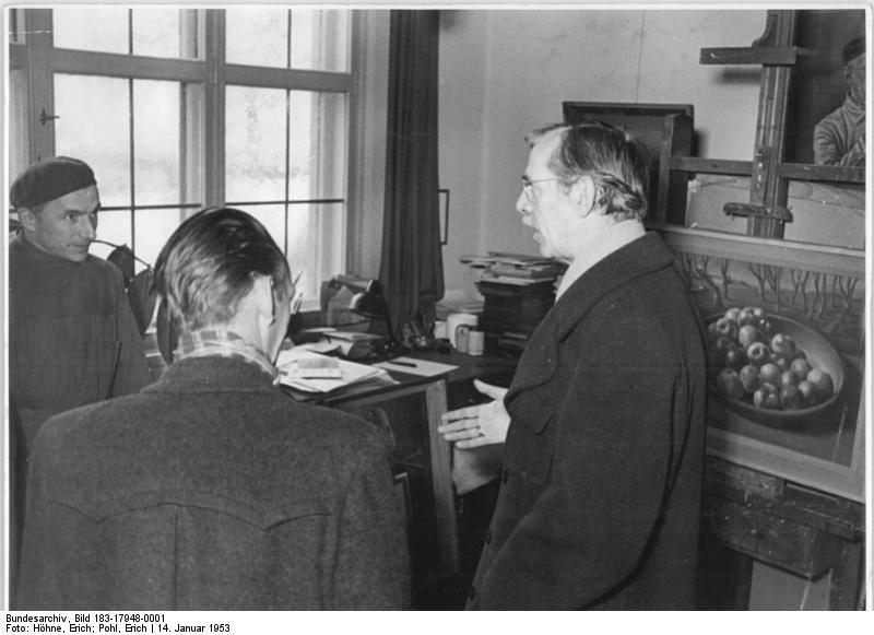 Dresden, Otto Nagel, Rudolf Nehmer Zentralbild Höhne-Pohl 14.1.1953 Vorbereitungen zur 3. Deutschen Kunstausstellung in Dresden In wenigen Wochen, am 1. März 1953, wird in Dresden die 3. Deutsche Kunstausstellung eröffnet, auf der die Künstler der Deutschen Demokratischen Republik gemeinsam mit den Künstlern Westdeutschlands ihre besten Arbeiten zeigen werden. Bedeutende Kunstschaffende besuchen jetzt die Ateliers der ausstellenden Künstler, um sie bei der Auswahl ihrer Werke zu beraten. UBz: Professor Nagel, Berlin, im Atelier des Kunstmalers Rudolf Nehmer, Dresden. Abgebildete Personen: Nagel, Otto Prof.: Maler, Präsident der Akademie der Künste (AdK), Nationalpreisträger, Vaterländischer Verdienstorden (VVO) in Gold, DDR (GND 118586300)